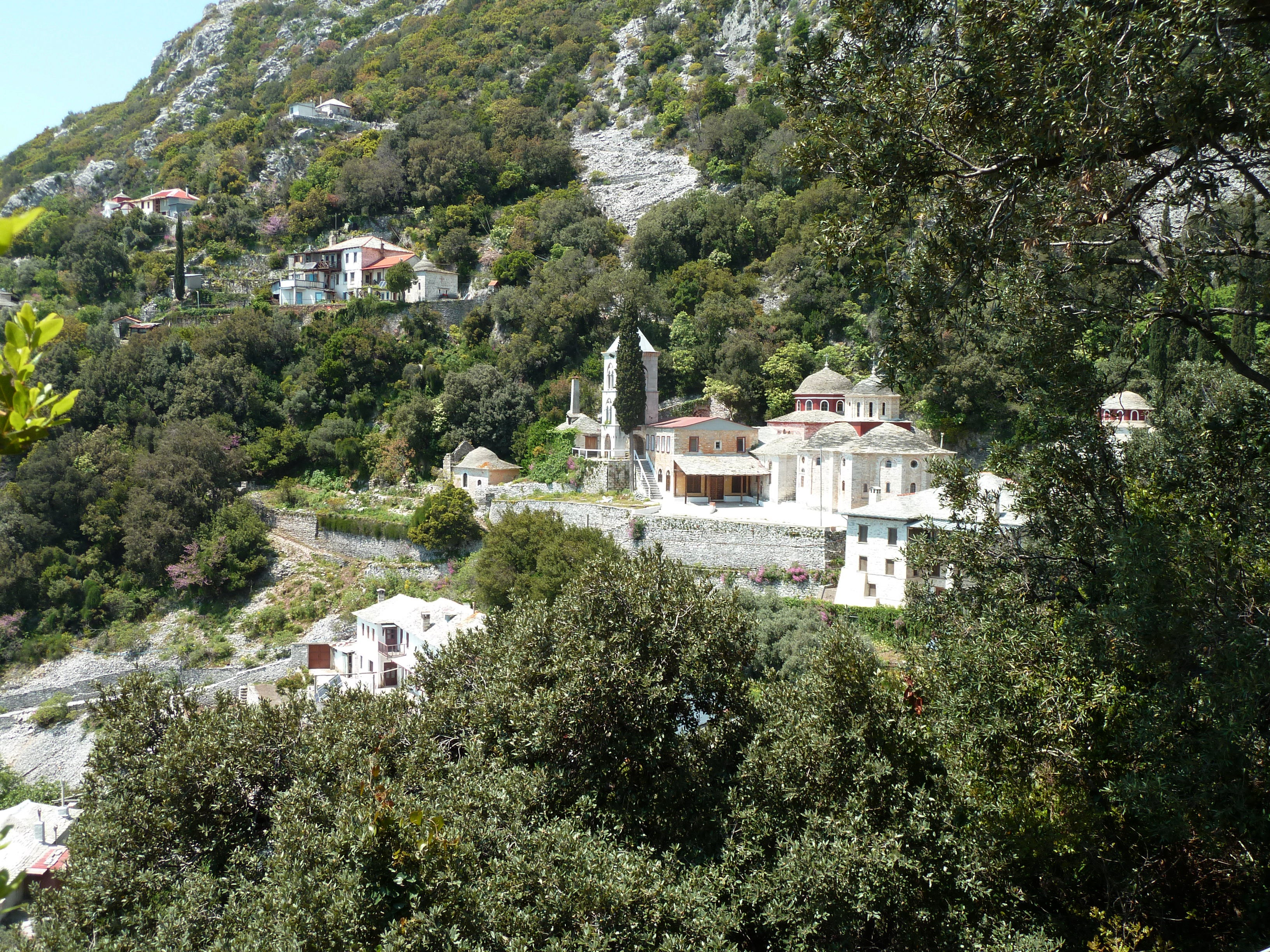 La skite Kafsokalyvia (Mont Athos)